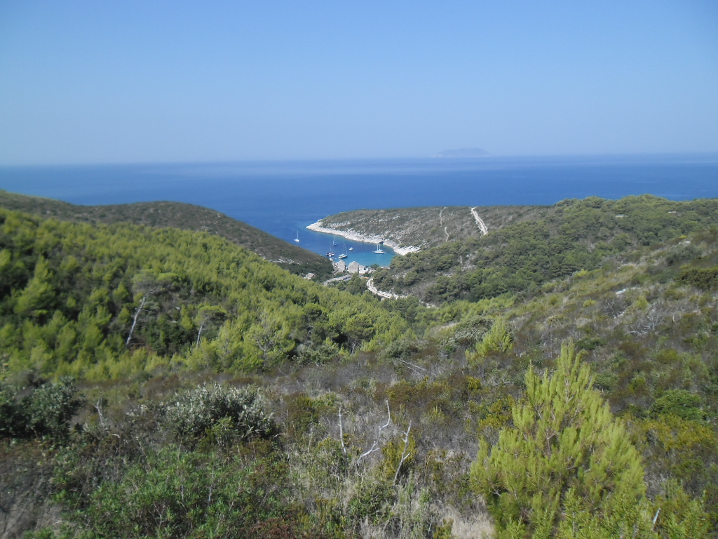 uvala Porat na otoku Biševu